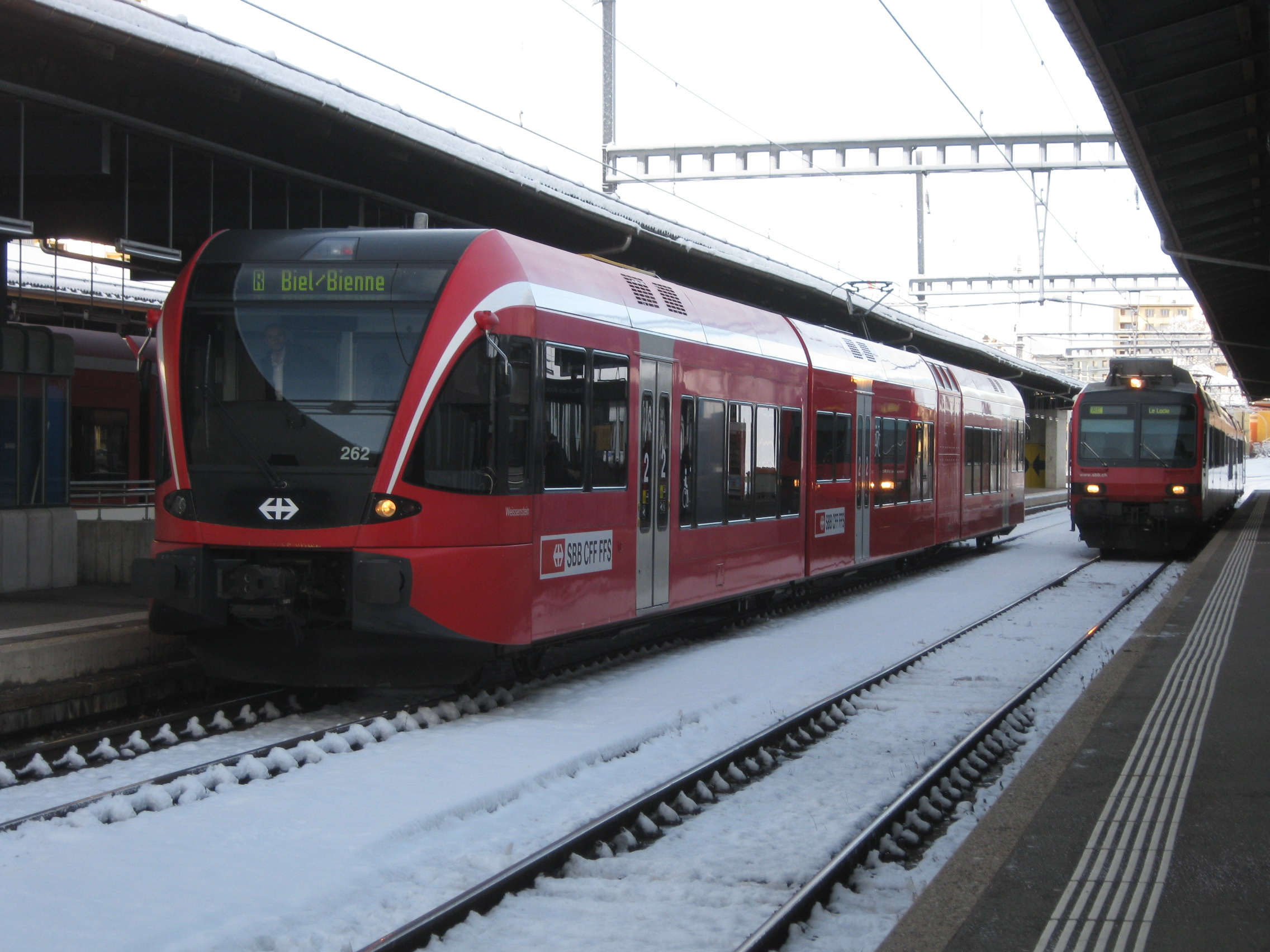 Une rame Stadler GTW, exploitée par les CFF, en gare de la Chaux-de-Fonds